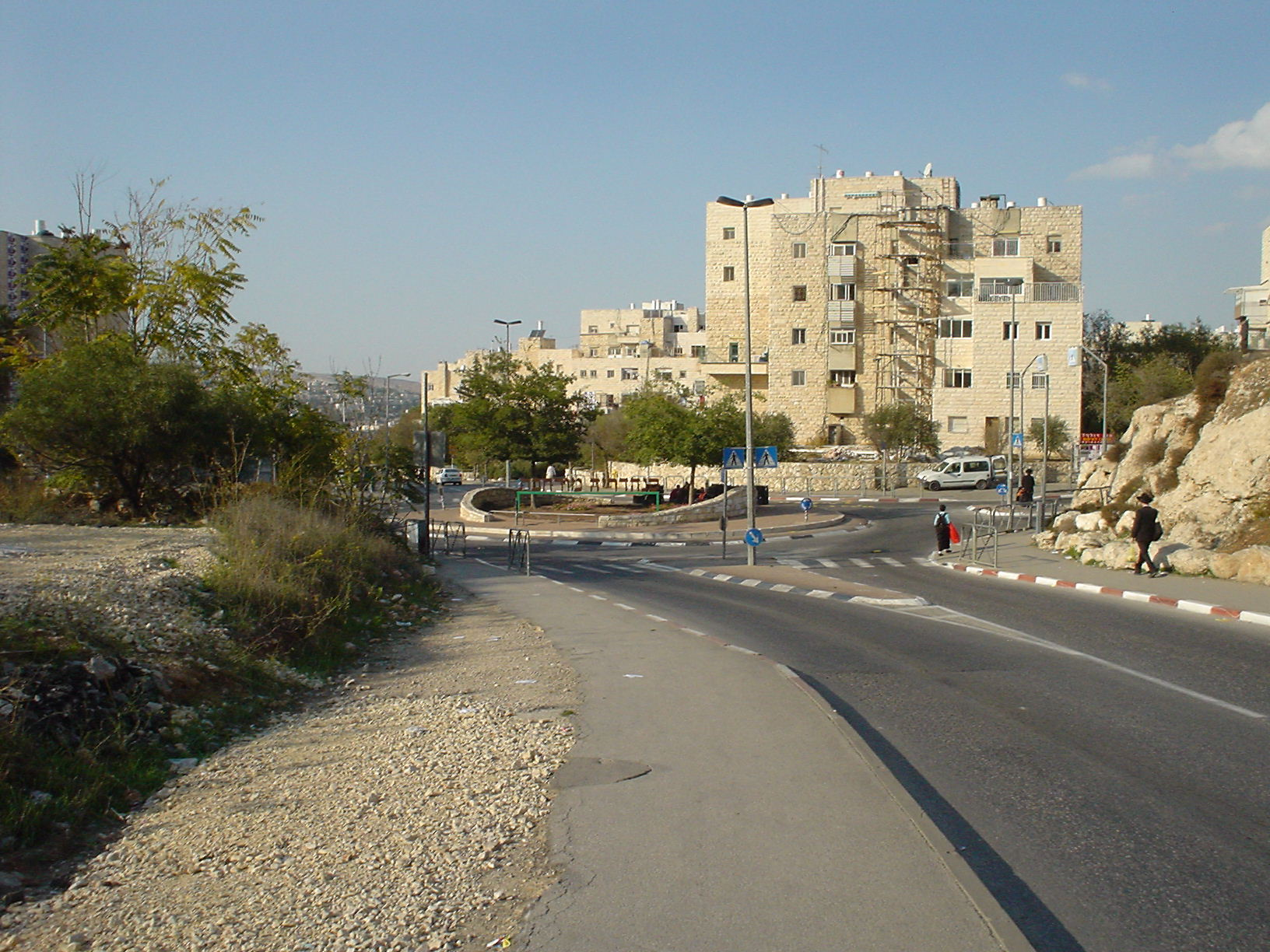 כניסה לשכונת סנהדריה מורחבת